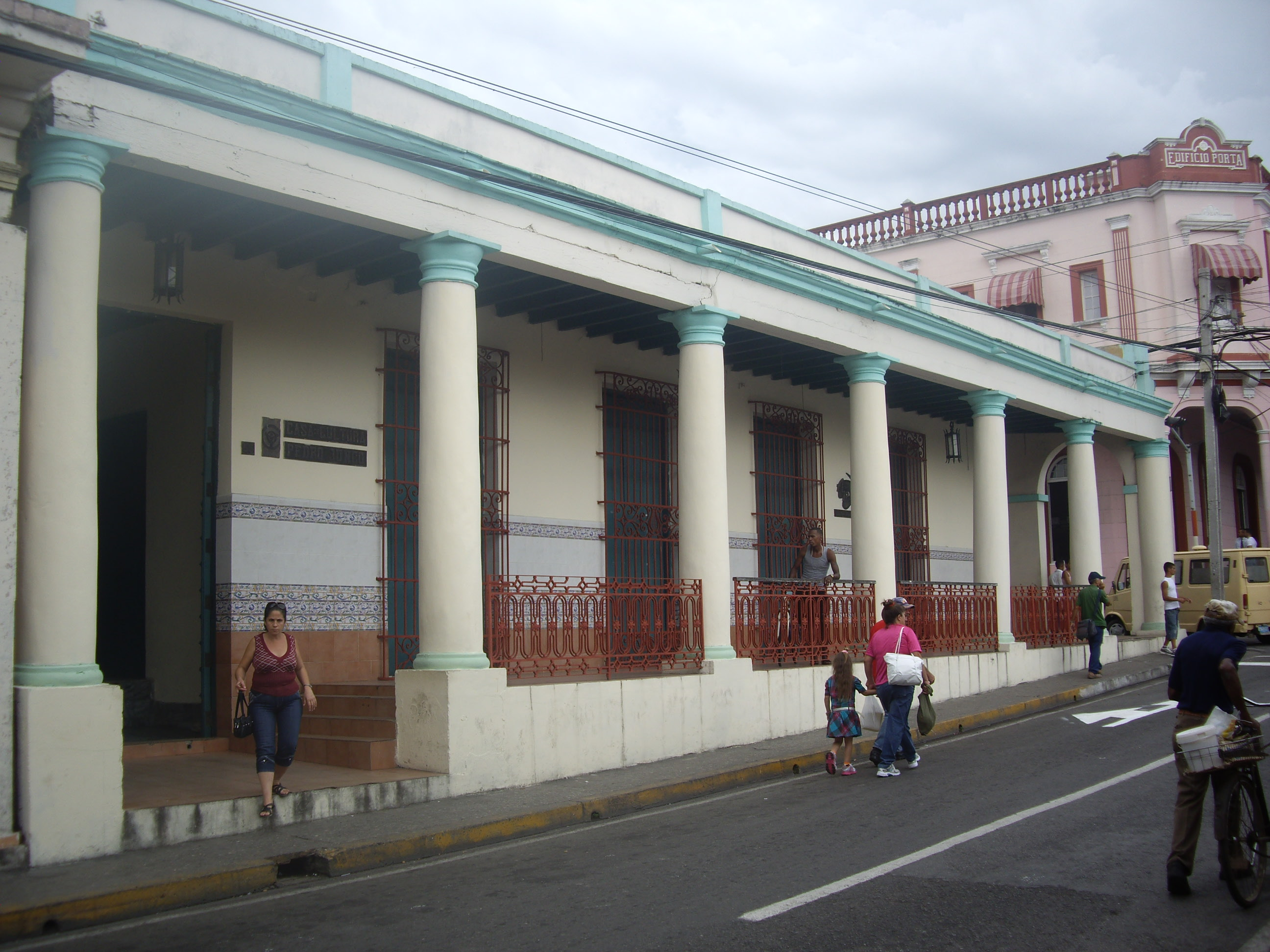 Casa de cultura Pedro Junco al carrer José Martí de Pinar del Rio